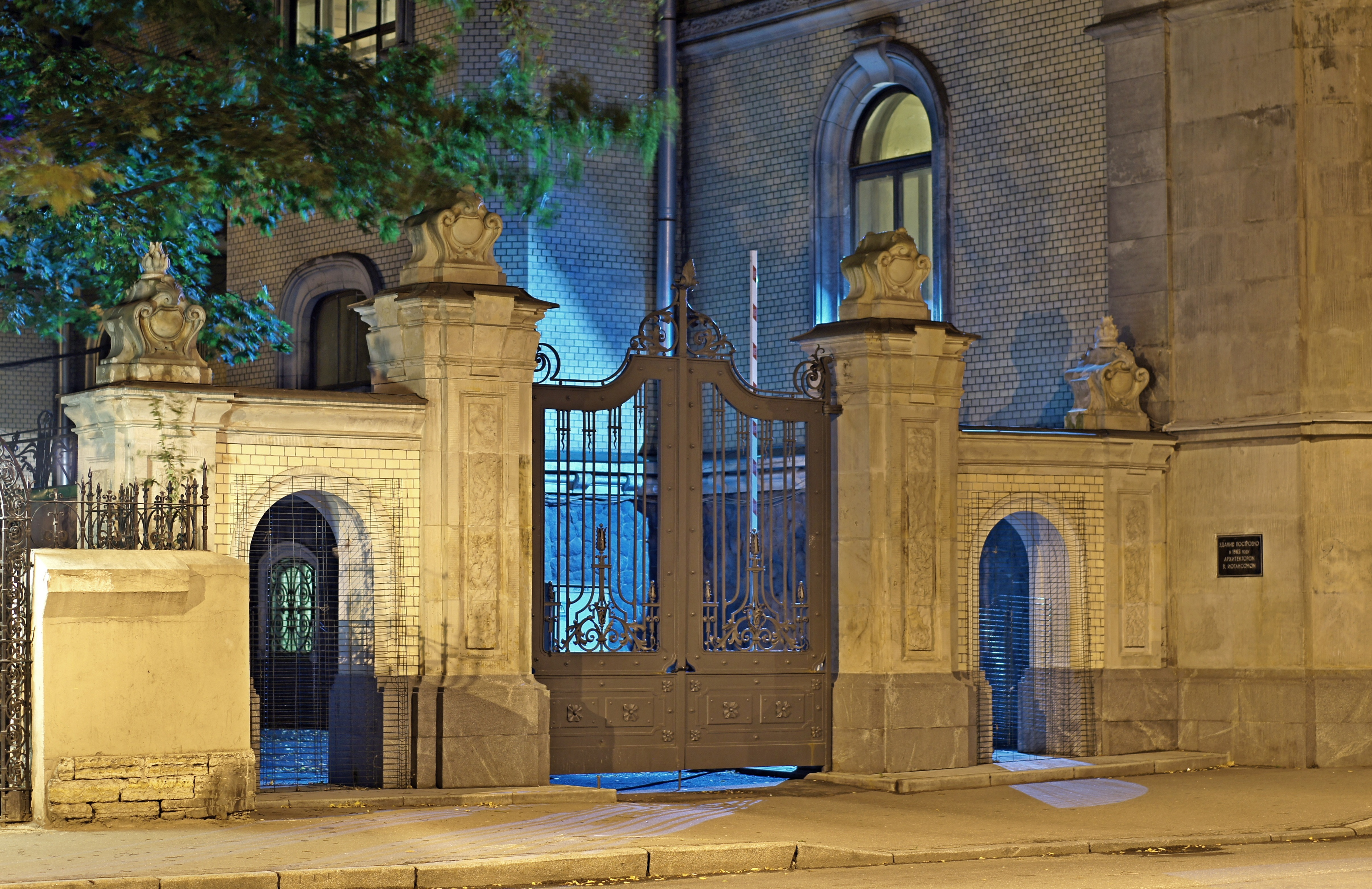 Ворота: проспект Английский, 8-10, Адмиралтейский район, Санкт-Петербург Ограды (две): проспект Английский, 8-10, Адмиралтейский район, Санкт-Петербург Номера объектов культурного наследия 7810019003 и 7810019004, часть памятника 7810019000